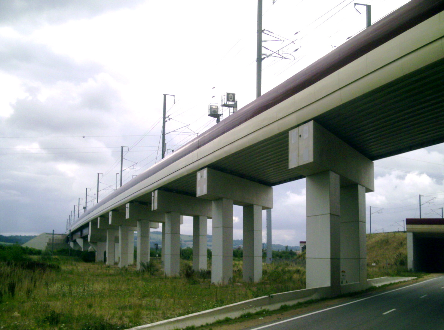 Viaduc de Vandières à l'emplacement de la future gare d'interconnexion entre la LGV est et la ligne Nancy-Metz. Photographie depuis la route.